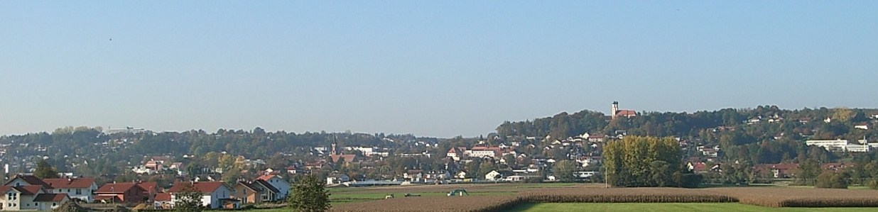 Panorama von Pfarrkirchen